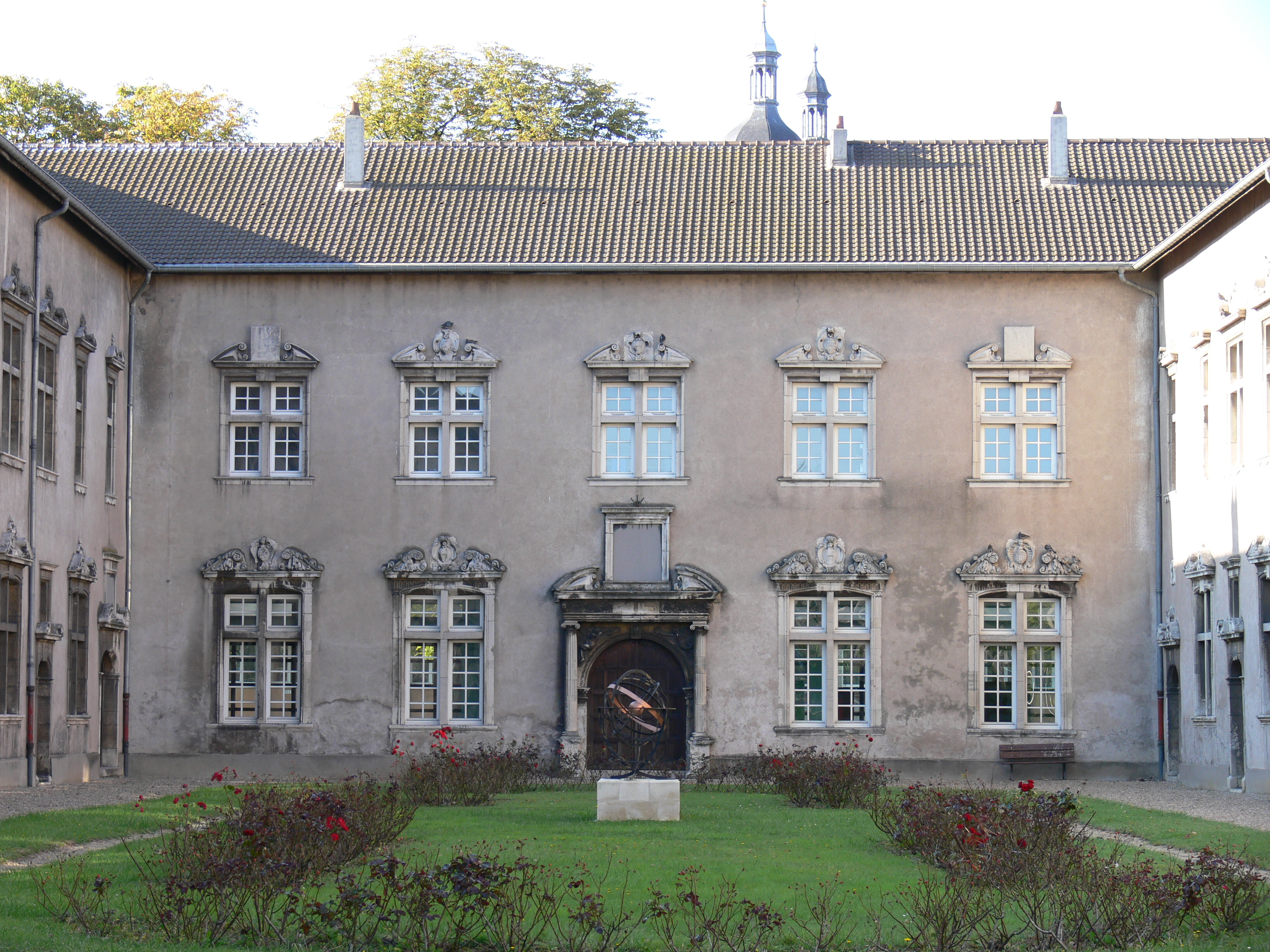 Renaissance Fassade der alten Universität von Pont-à-Mousson, hervorgegangen aus einem Jesuitenkolleg